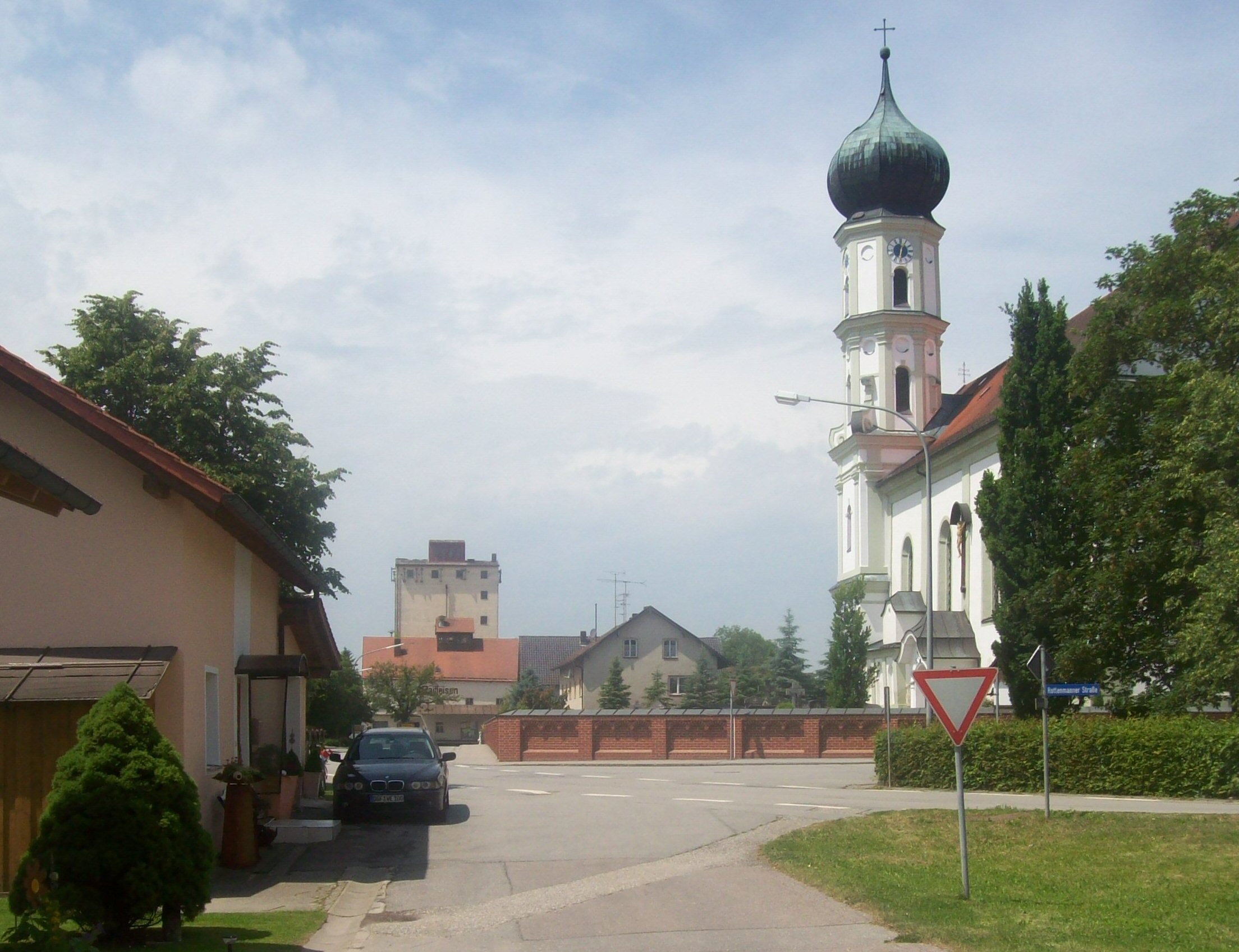 Altenbuch: Ansicht von Osten